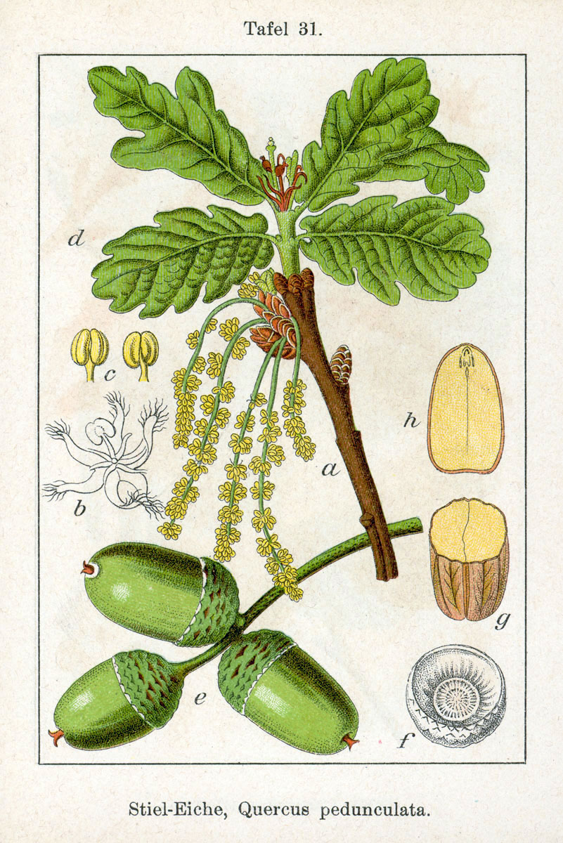 Quercus robur subsp. robur, syn. Quercus pedunculata Ehrh. , nom. inval. (nom. nud.) Original Description Stiel-Eiche, Quercus pedunculata